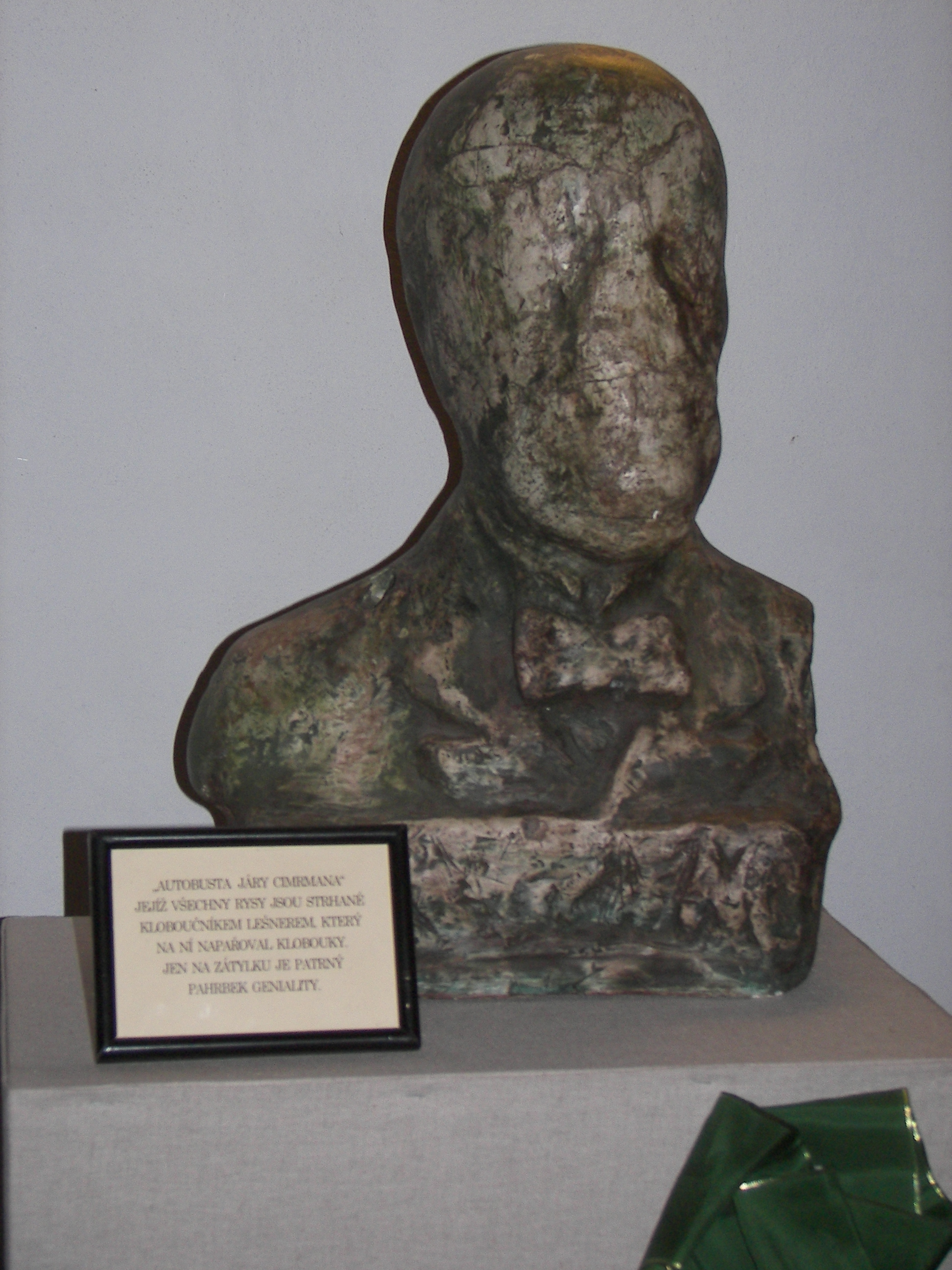 Cimrmanova autobusta, foto z výstavy v Jindřichově Hradci